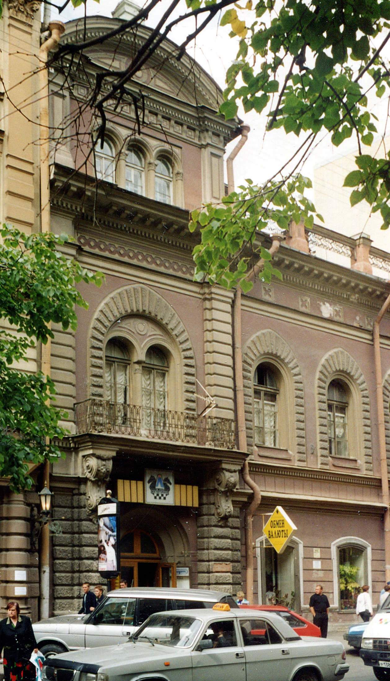 Здание бывшей французской церкви